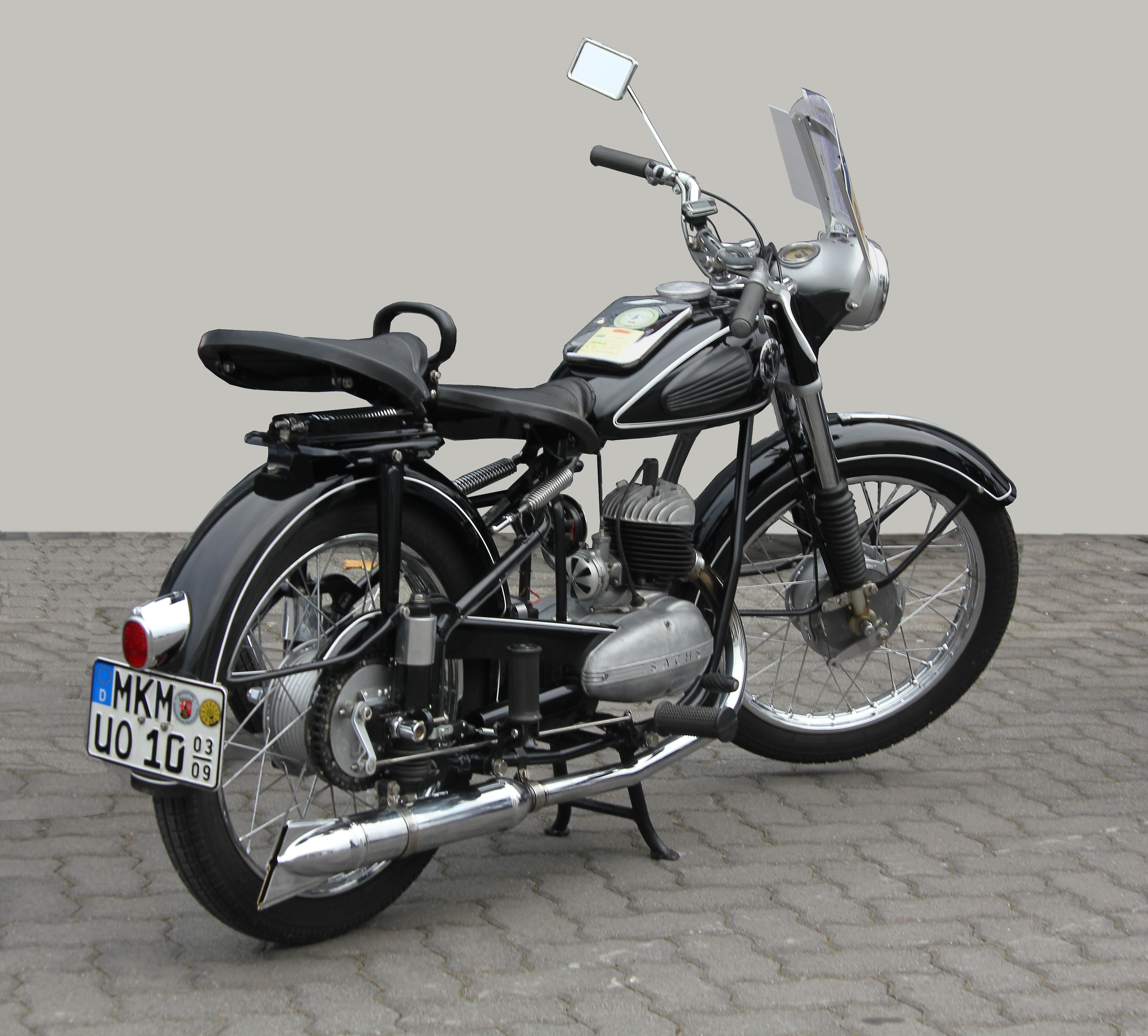 Anker 665, Baujahr 1952, 147-cm³-Sachsmotor, 6 PS bei 4500/min, Höchstgeschwindigkeit 85 km/h (Kennzeichen des Fahrzeugs verändert)